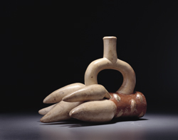 Cerámica Mochica representando yuca. Museo Larco.